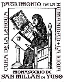 Scriptorium san millan